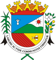 Brasão do Município de Santo Antônio de Posse - SP